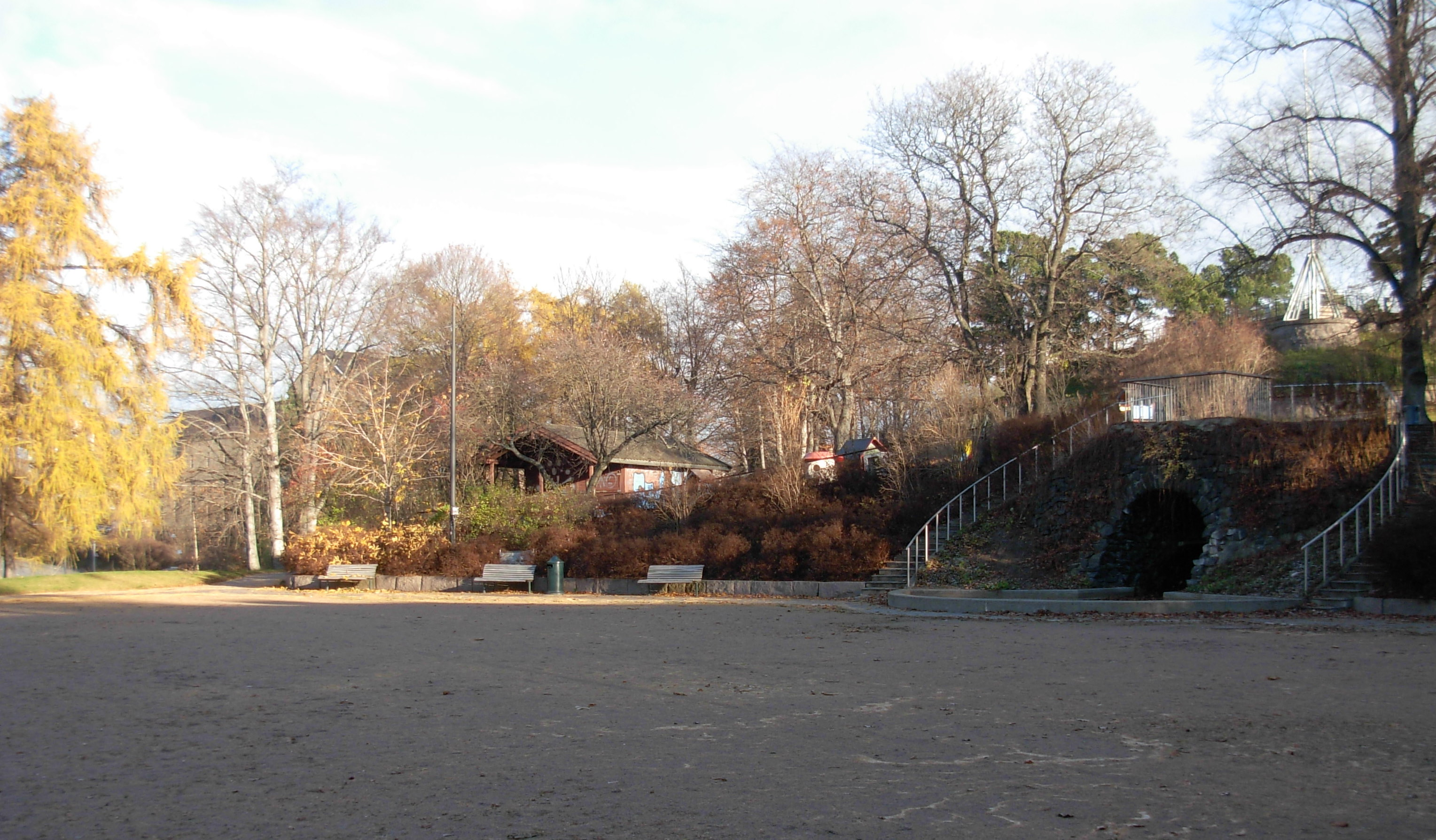 Kampen park, nedre del